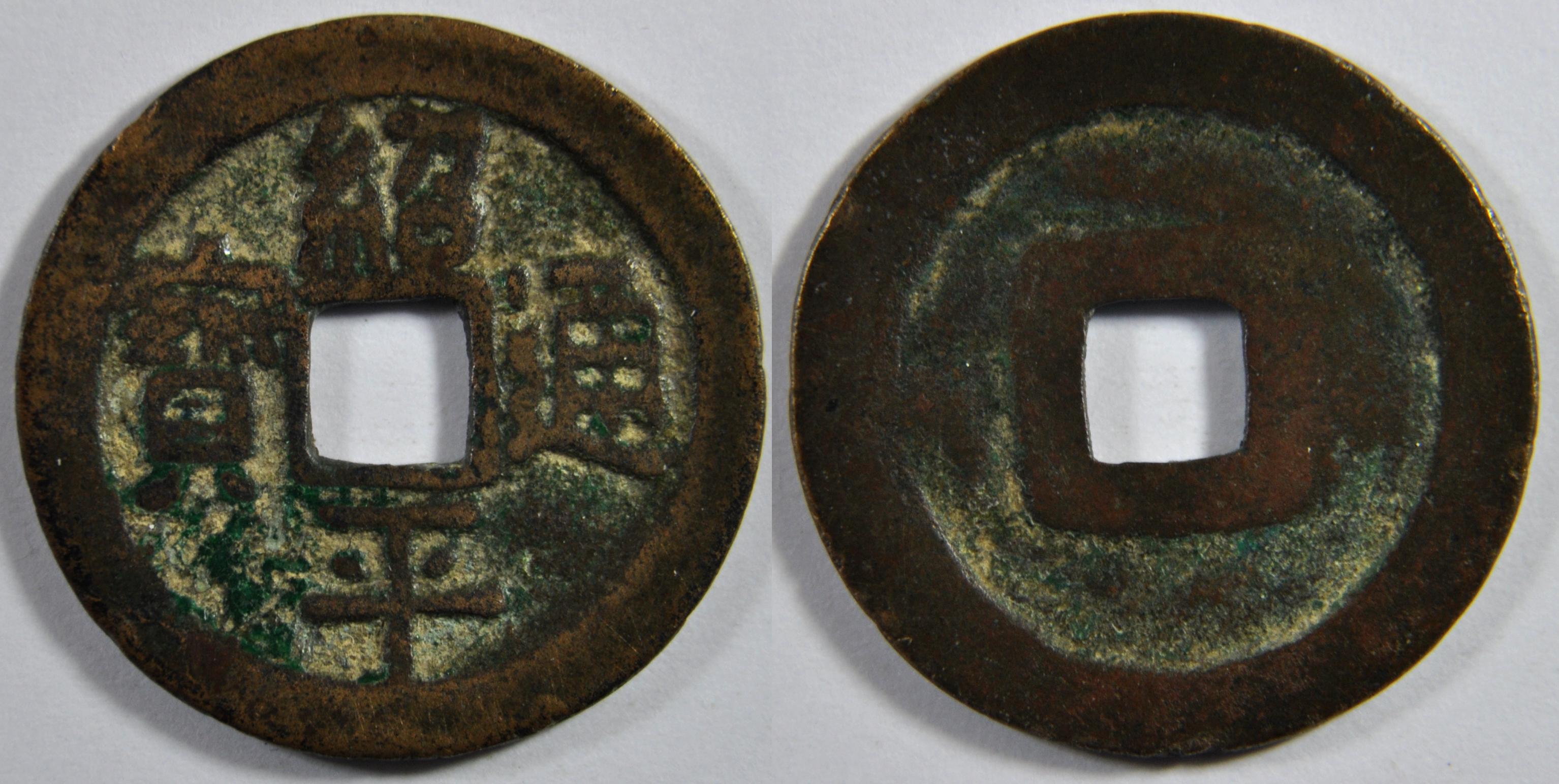 Une monnaie en cuivre d'une sapèque de l'empereur Thai Tong (1433-1442), ère Thieu Binh (1434-1439) de la dynastie des Le postérieurs (Nha Hau Le) qui a dirigé le Vietnam de 1428 à 1788. A l'époque, le pays s'appelait le Dai Viet. A/ Thieu Binh thong bao (Monnaie courante de l'ère Thieu Binh) R/ vide Dimension : 24,51 mm Poids : 3,2 g. Remarques : La monnaie est de belle qualité mais la graphie est lourde, épaisse. Thai Tong est le deuxième empereur de la dynastie. Il succède à son père Le Loi, fondateur de la dynastie, à l'âge de 10 ans en 1433. C'est le conseiller de son père Le Sat qui gouverne à sa place et pour lui. Thai Tong fait alliance avec un autre conseiller de son père, Trinh Kha qui avait été exilé loin. En 1438 à 15 ans, il prend officiellement le pouvoir et finit par éliminer Le Sat qui est éxécuté. L'empereur était un chaud lapin qui aimait bien les jeunes femmes. Il avait demandé que les plus belles jeunes filles de l'empire lui soit réservé. Il était pourtant marié et avait aussi des concubines. En 1442, il commence une liaison avec la femme d'un conseiller de son père. Il voyage avec elle mais le roi meurt rapidement. La jeune femme et son mari ont été exécutés pour empoisonnement. Pourtant, 20 ans plus tard, l'empereur Le Thanh Tong innocente officiellement le couple. Références : 409 BNF (Catalogue des monnaies vietnamiennes, François Thierry, 1988), Mitchiner NIS 4471 Indice de rareté : C (Commune)